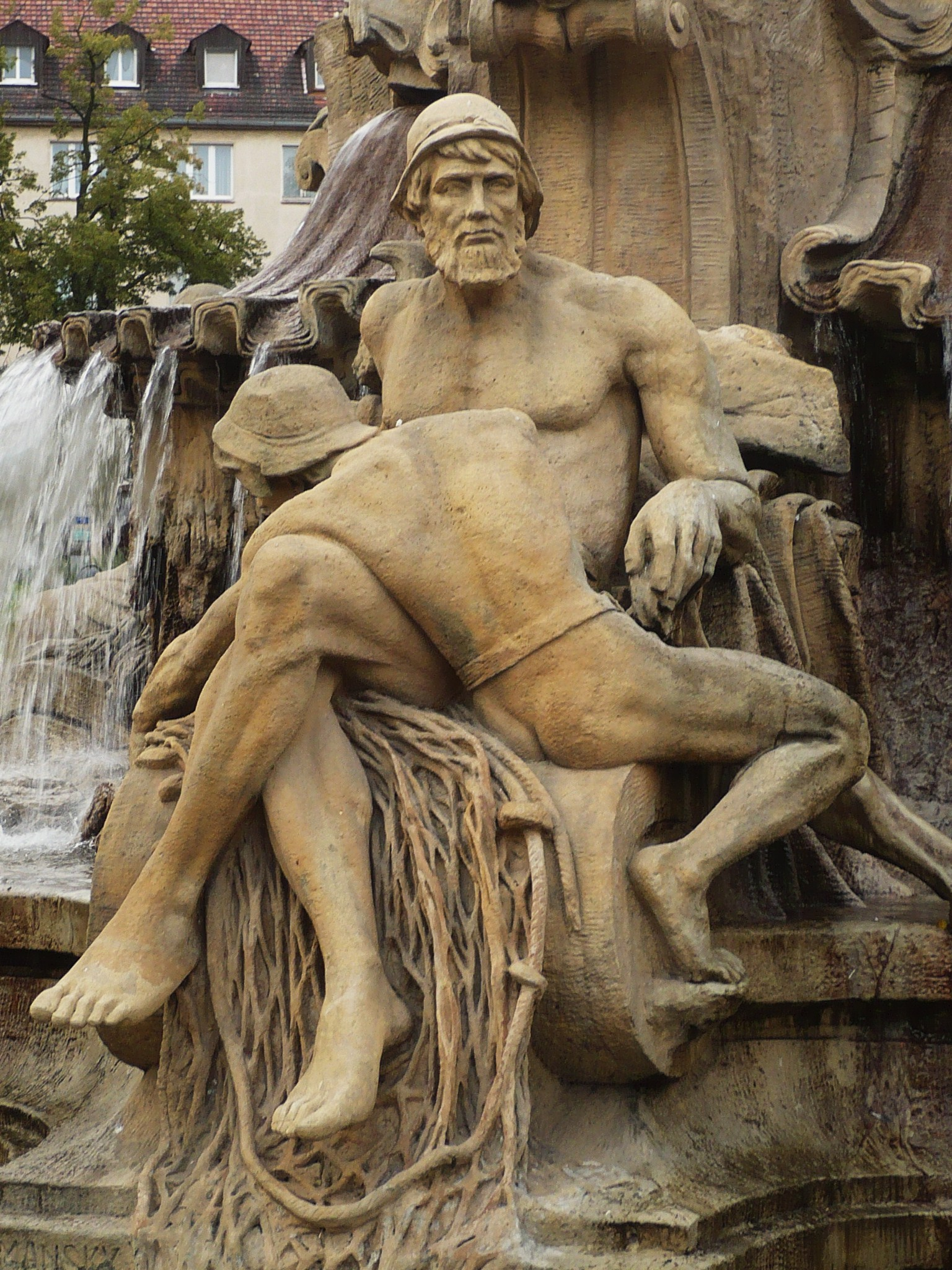 Opole. Fontanna Ceres